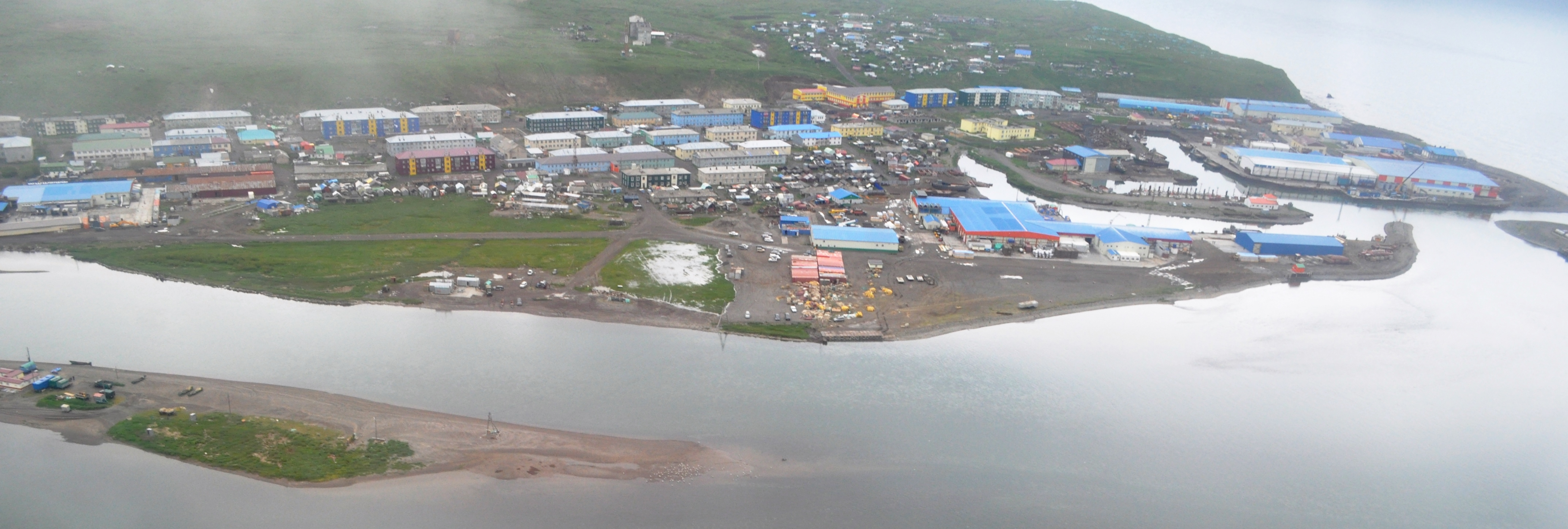 юго-западная часть поселка